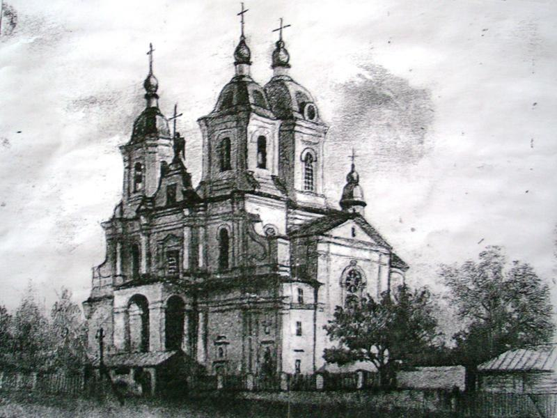 Беларуская (тарашкевіца): Бялынічы (Białyničy), пляц Рынак (plac Rynak). Касьцёл Унебаўзяцьця Найсьвяцейшай Панны Марыі і кляштар кармэлітаў